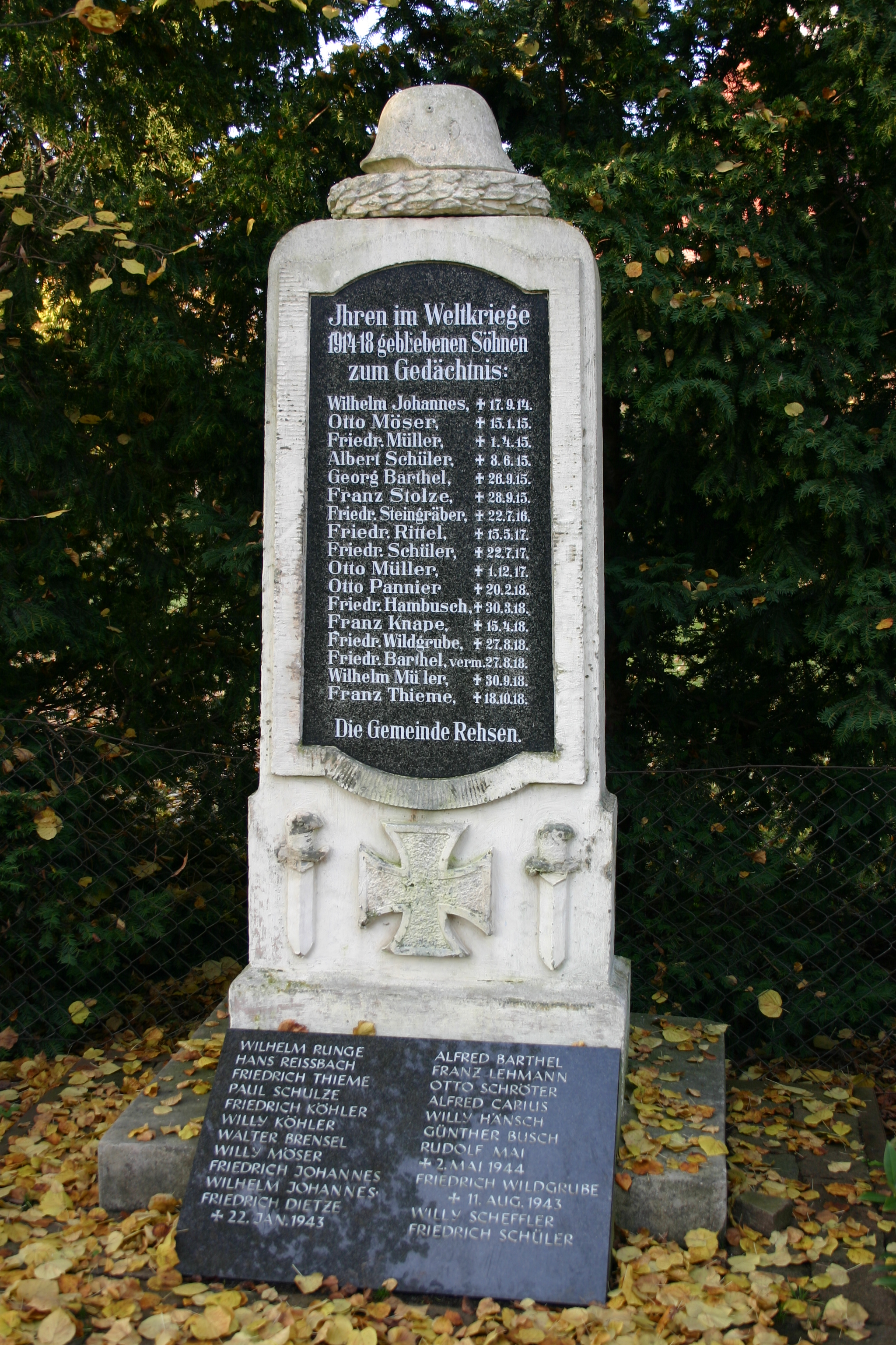 Das Kriegerdenkmal der Gemeinde Rehsen im Wörlitzer Winkel. Es enthält auf 2 Tafeln die Namen der im Ersten und Zweiten Weltkrieg Gefallenen Einwohner des Ortes.